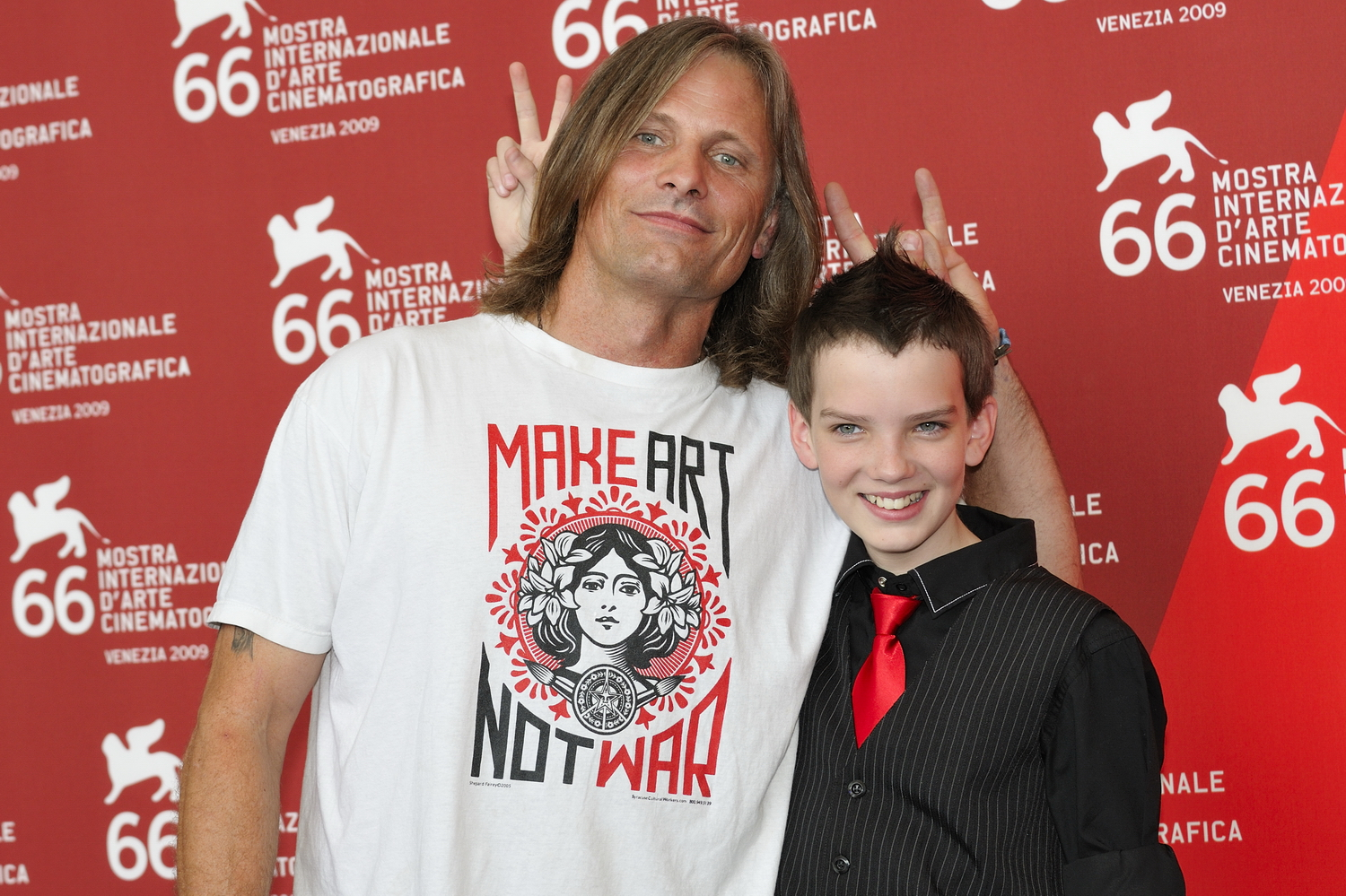 66ème Festival du Cinéma de Venise (Mostra), 2ème jour (03/09/2009) Photocall avec Viggo Mortensen pour le film : The Road